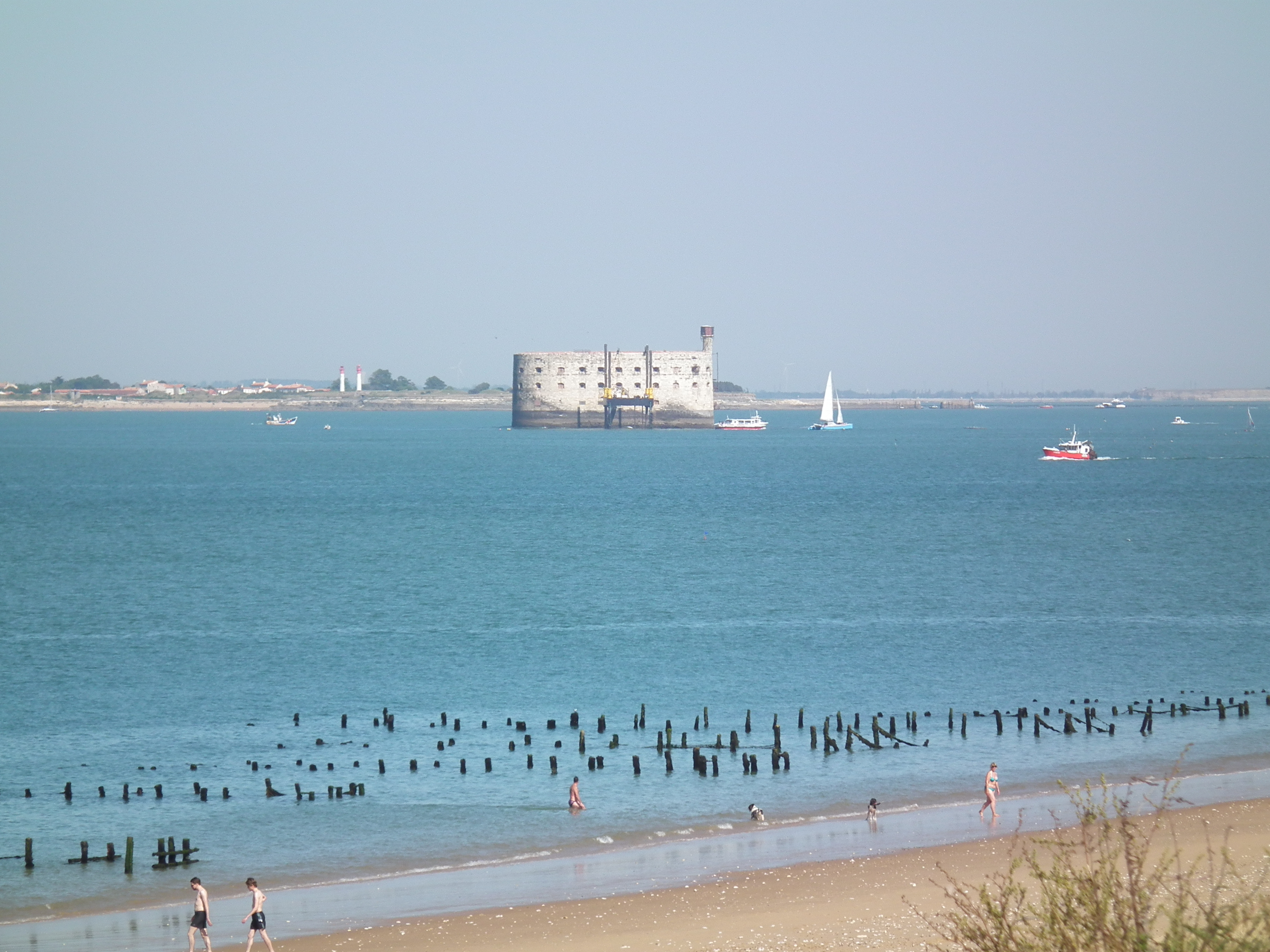 Fort Boyard depuis la plage des Saumonards